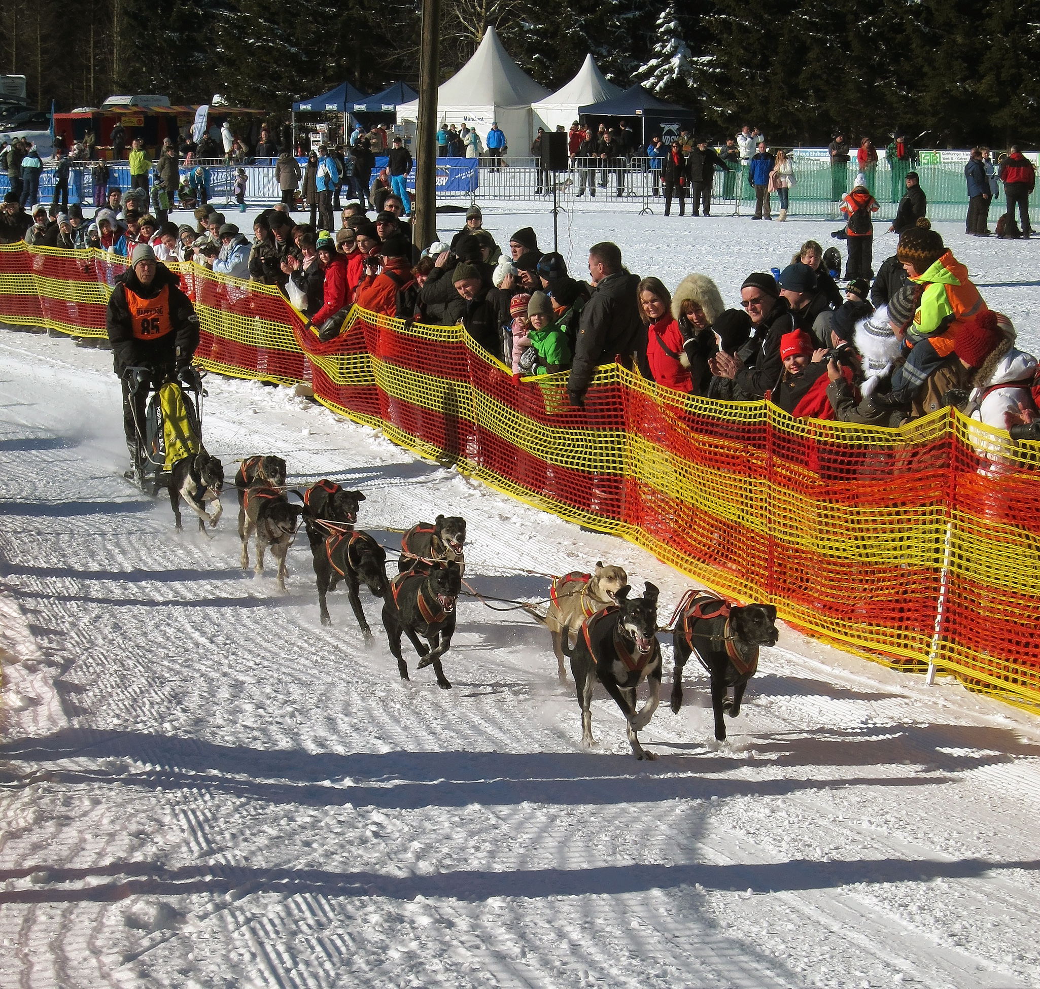 Hundeschlittenrennen Frauenwald, Rudi Ropertz